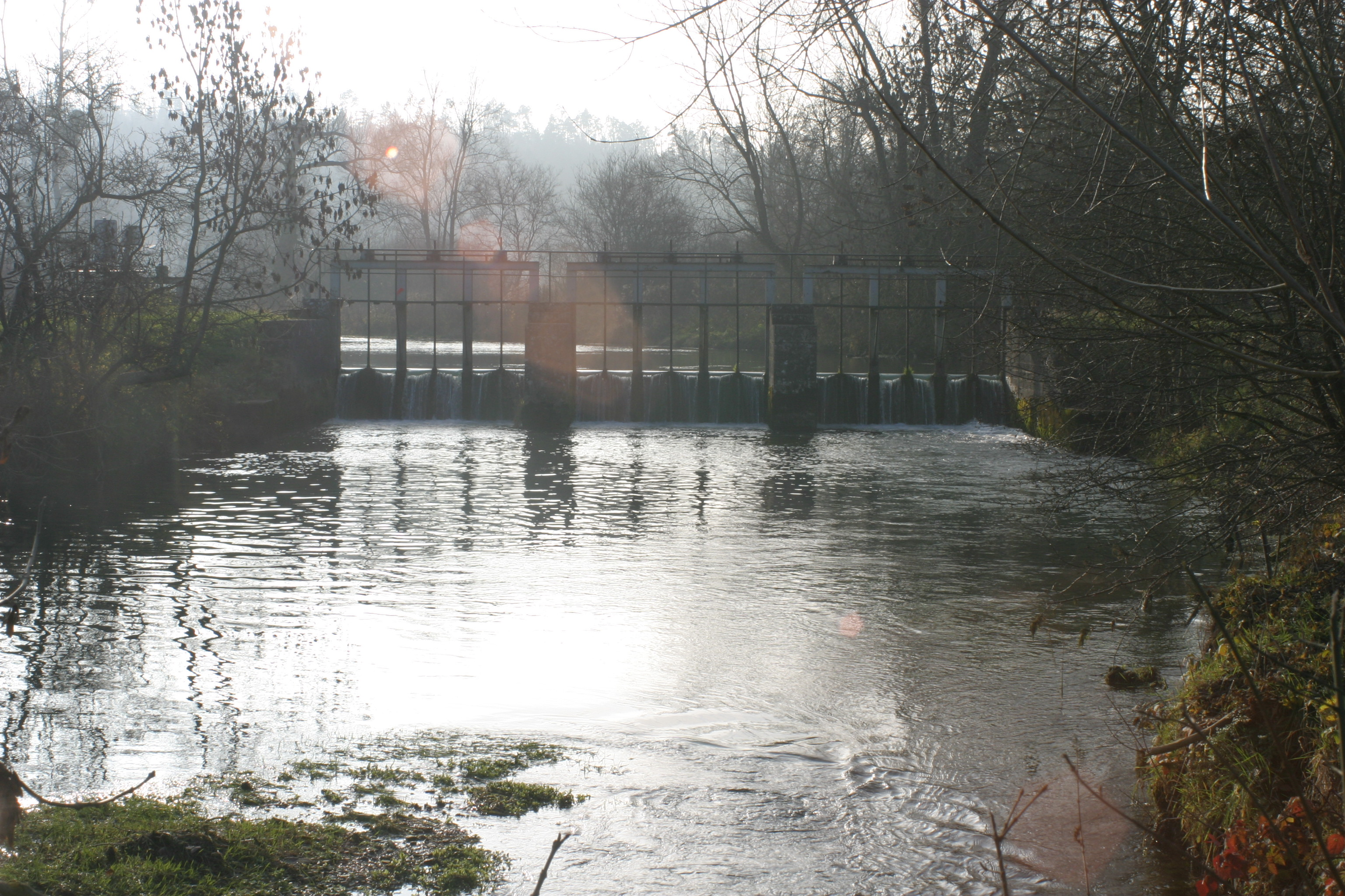 Méholle ou Vidus, c'est un vrai débat... Ce barrage sert à réguler le niveau du canal de la Marne au Rhin. Il est situé en aval du confluent de la Méholle avec le ruisseau de Vacon. Soit l'eau alimente le grand bief de Void à Lay Saint Rémy, ou bien le bief de partage de Mauvages. Dans ce cas l'eau est pompée par l'usine de Vacon et amenée par une rigole alimentaire de 10km de long, jusqu'à l'amont de l'écluse n°1 (Mauvages).